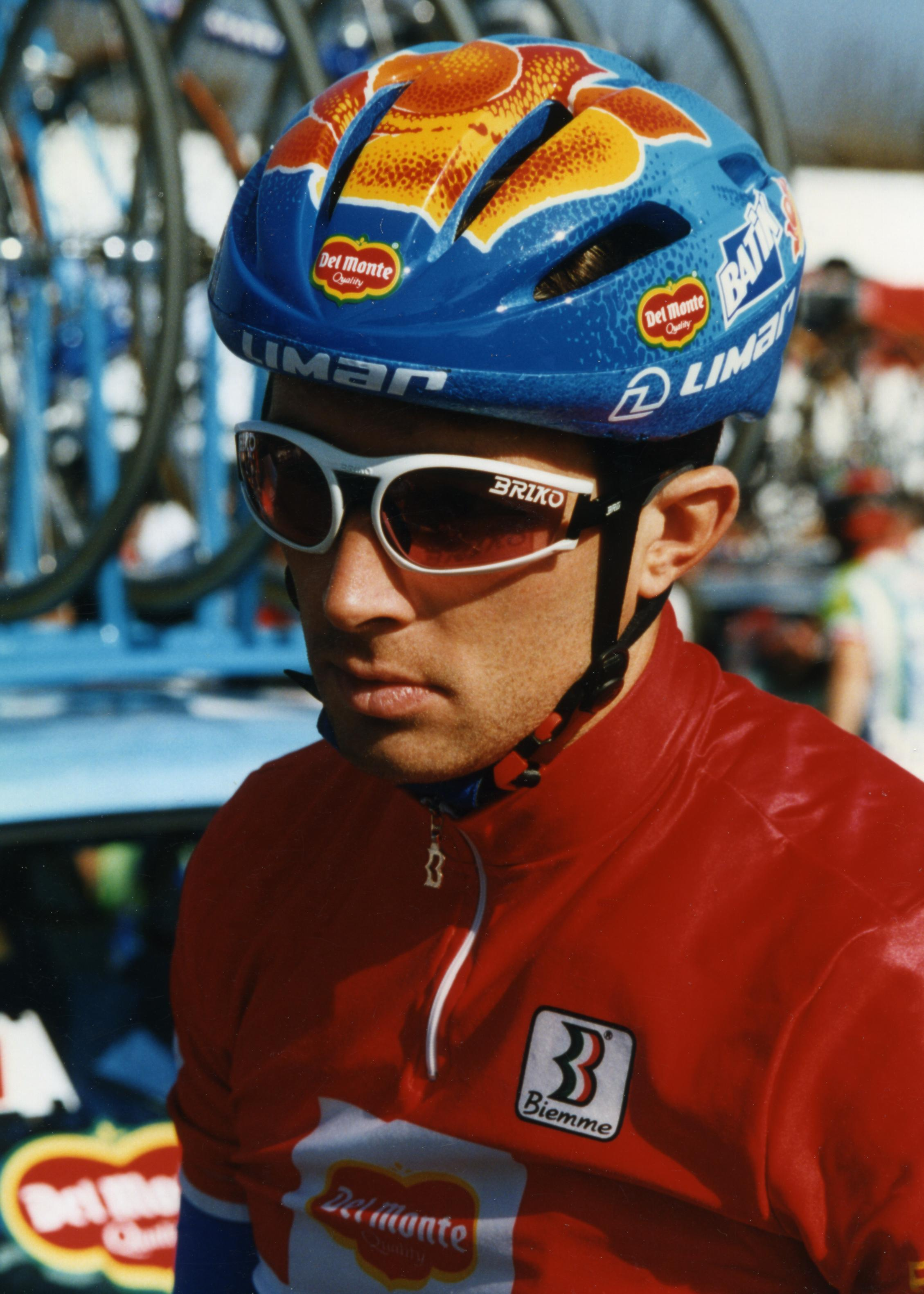 PARIS-NICE 1997